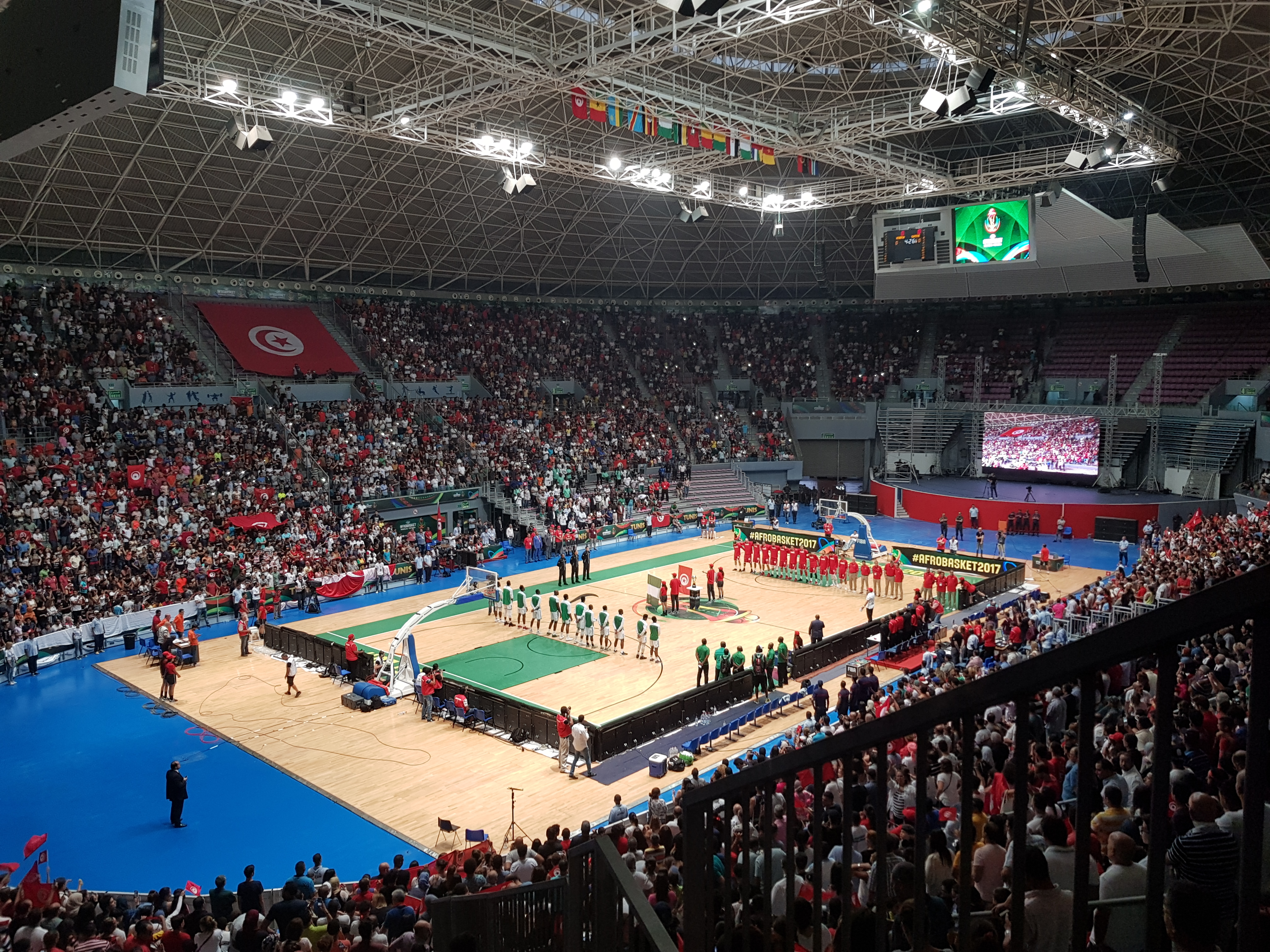 المباراة النهائية لكأس إفريقيا لكرة القدم رجال2017 بين تونس و نيجيريا بالقاعة المغطاة برادس